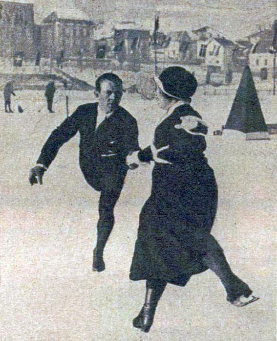 Alfred Berger et Helene Engelmann, champions olympiques de patinage en 1924 à Chamonix.